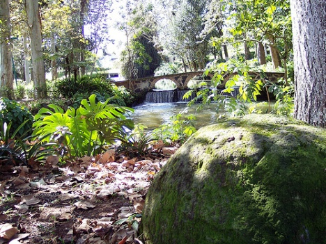 UNA PINTORESCA VISTA DEL PARQUE DE LA SEÑORIA